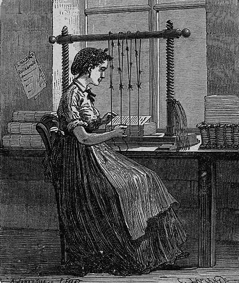 Brocheuse s'appliquant à relier des livres devant son cousoir, milieu XIXe siècle. Image scanée spécialement pour wikipedia à partir d'un livre du XIXe siècle, libre de droits.